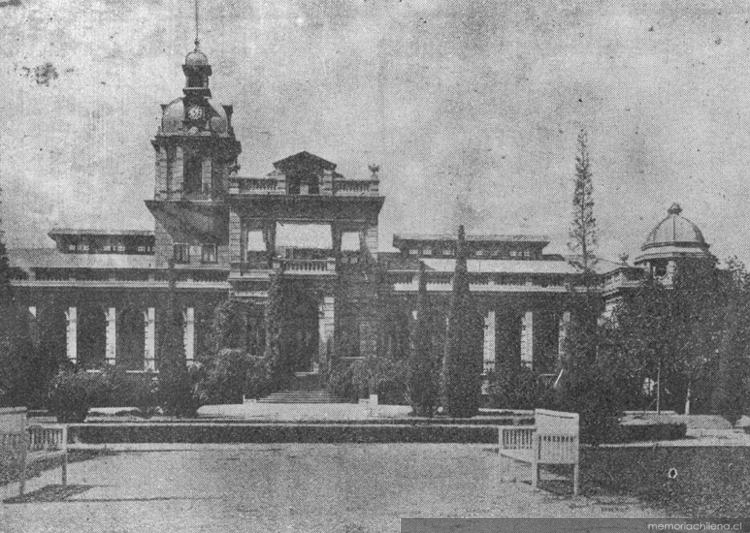 Palacio en la Hacienda Las Casas de Quilpué, San Felipe, Chile, foto tomada en 1922